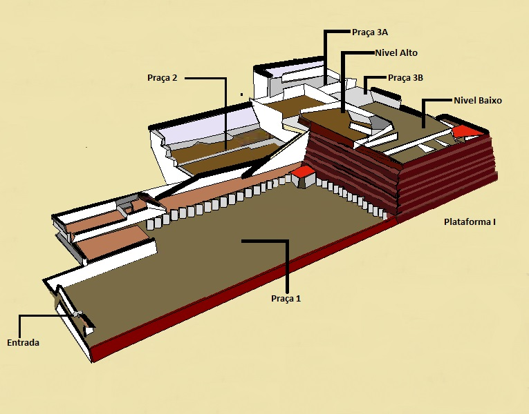 maquete de Huaca de la luna